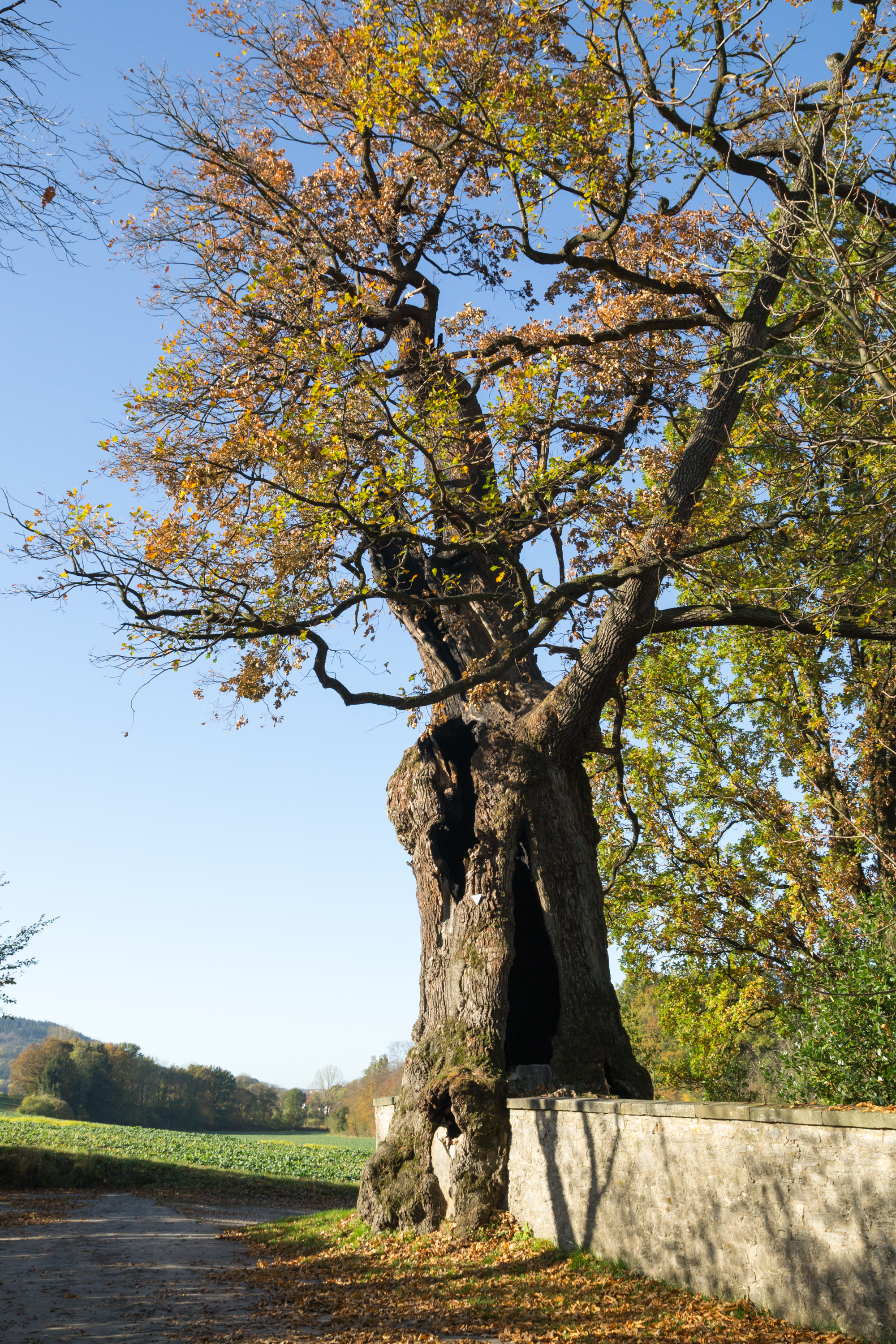 Naturdenkmal "1000-jährige Eiche" am Rittergut Hornoldendorf